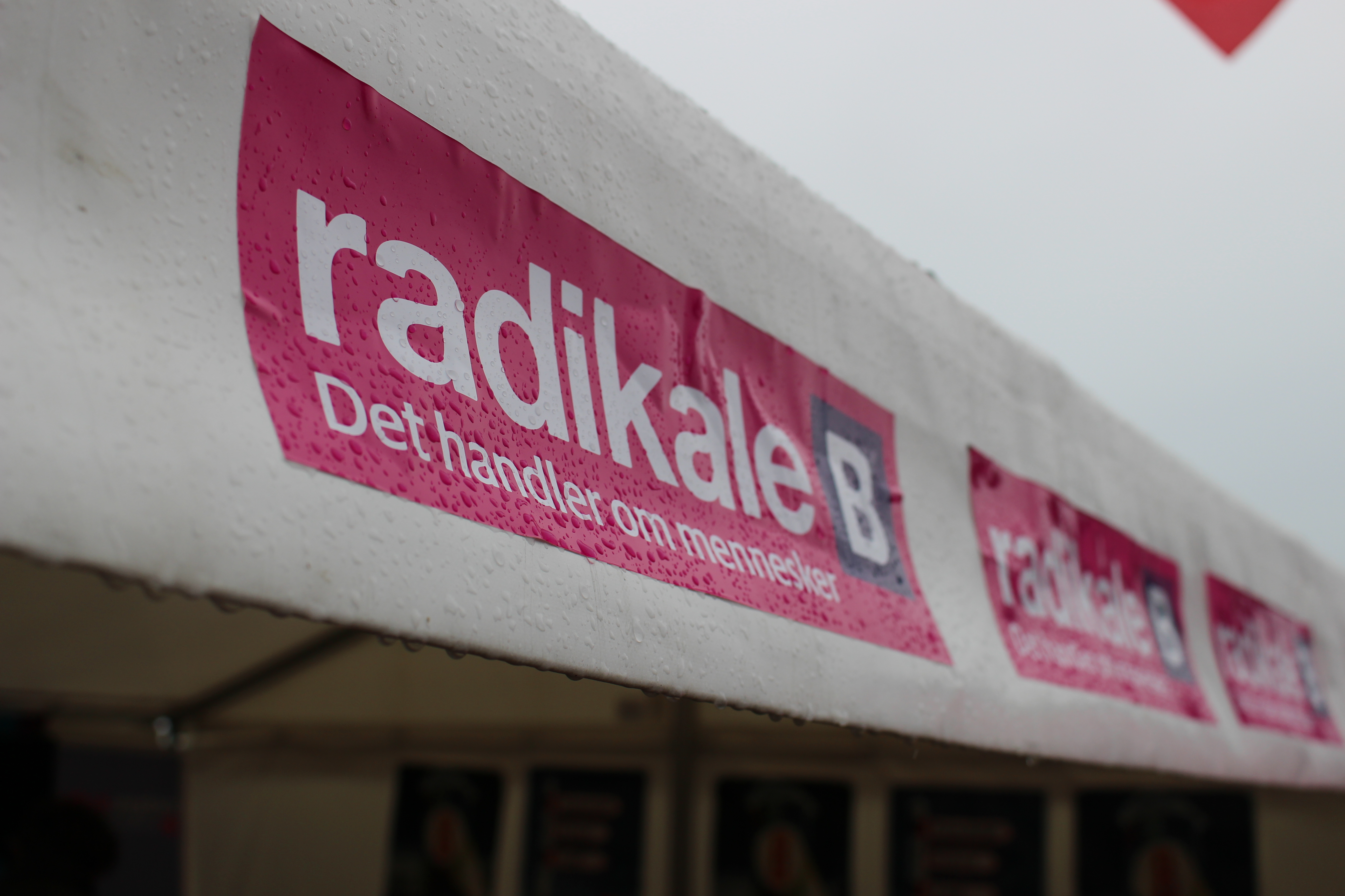 Det Radikale Venstres telt ved Folkemødet 2016